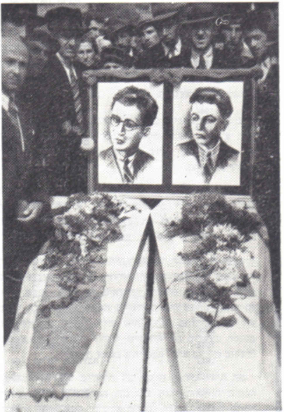 הלוויית האחים אלבלח מצ'ירפאן שנורו למוות בידי המשטרה הבולגרית ב-18 באוקטובר 1943, בחשד לסיוע לפרטיזנים.